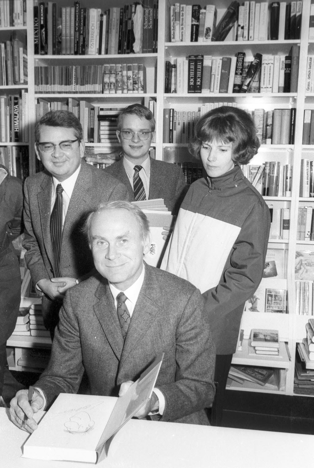 Im Hintergrund links in der Bildmitte der Inhaber Hans Hermann Helmerich.